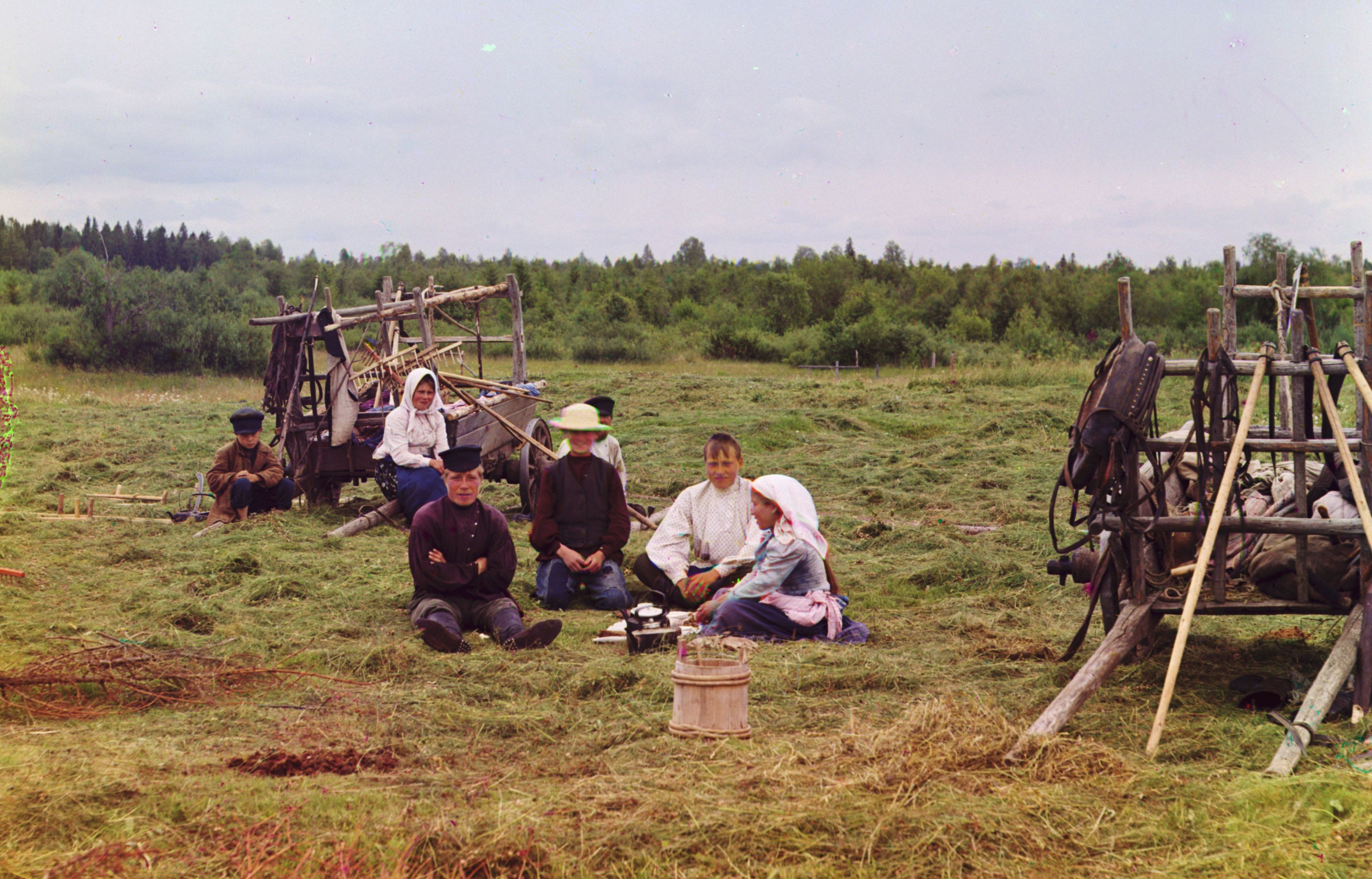 С. М. Прокудин-Горский. Крестьяне на покосе. Нижегородская губерния, 1909 год. Кадрирование: В.Лобачев